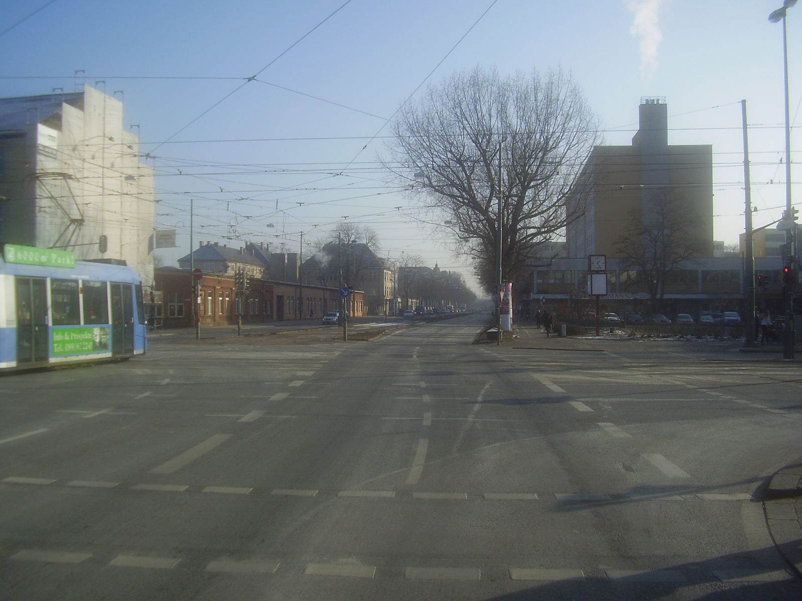 Dachauerstraße, München; Blickrichtung Südost vom Leonrodplatz.